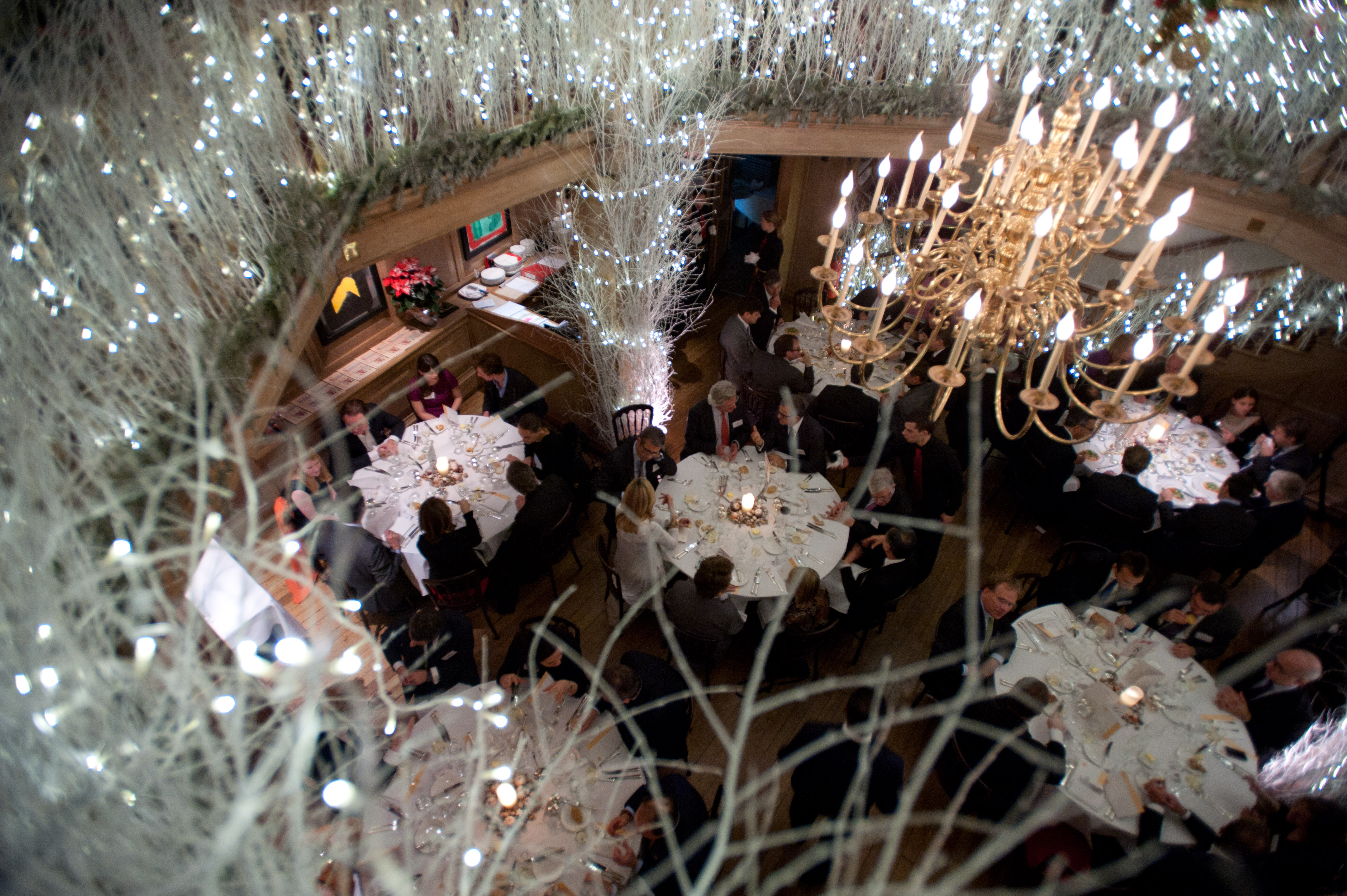 Mosimann's